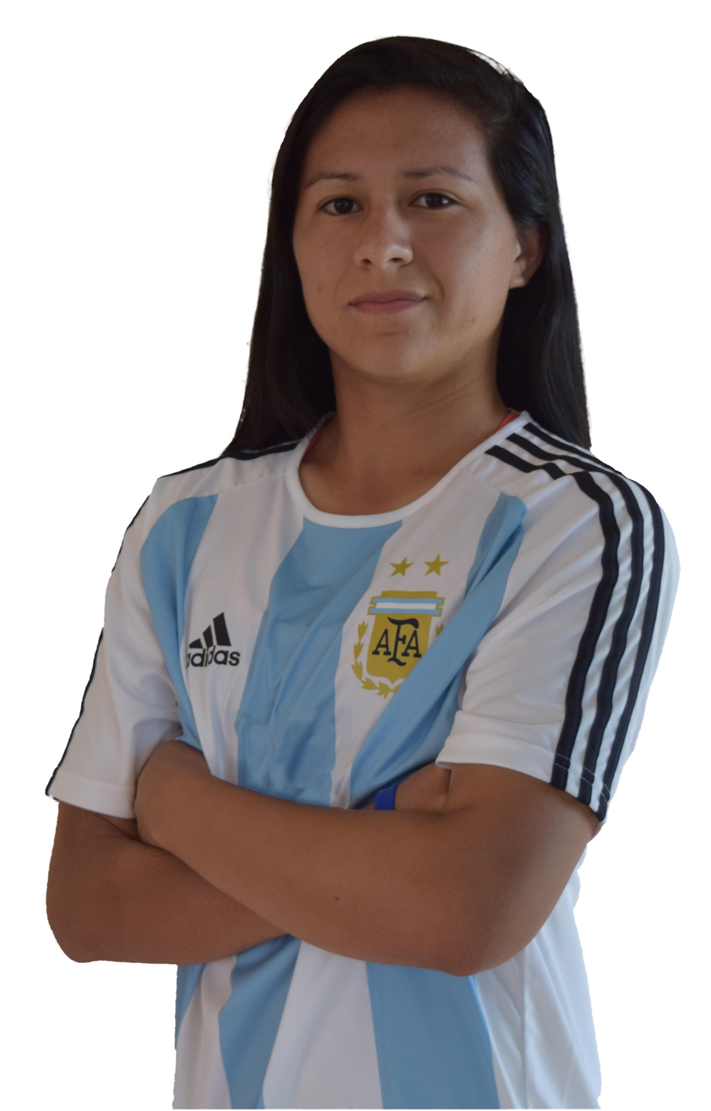 Eliana Stabile, jugadora de la selección mayor femenina de fútbol de Argentina.Foto sacada previo al primer partido del repechaje por un lugar para el mundial de futbol femenino de Francia 2019